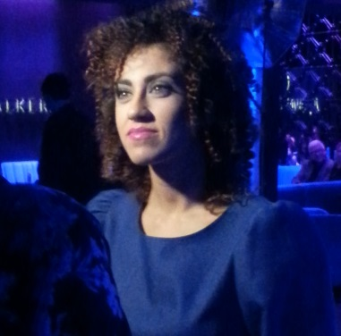 Polska piosenkarka Maja Hyży.